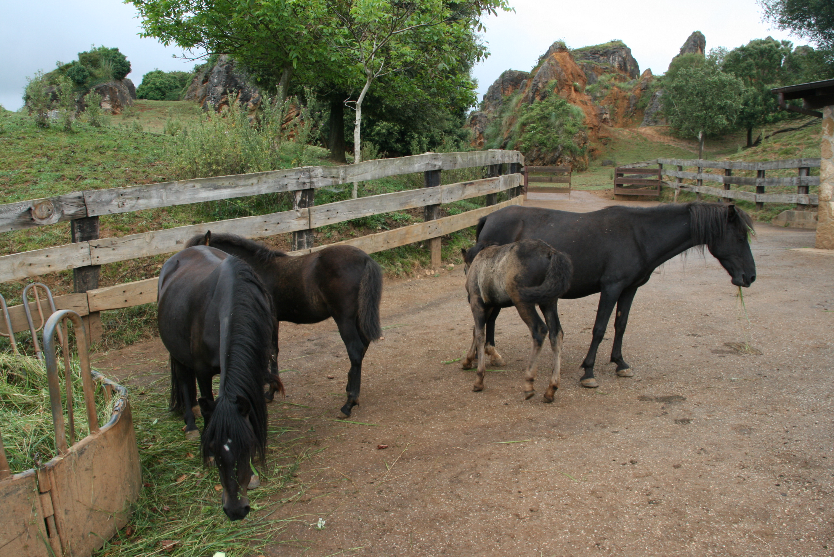 Caballos monchinos en el Parque de la naturaleza de Cabárceno